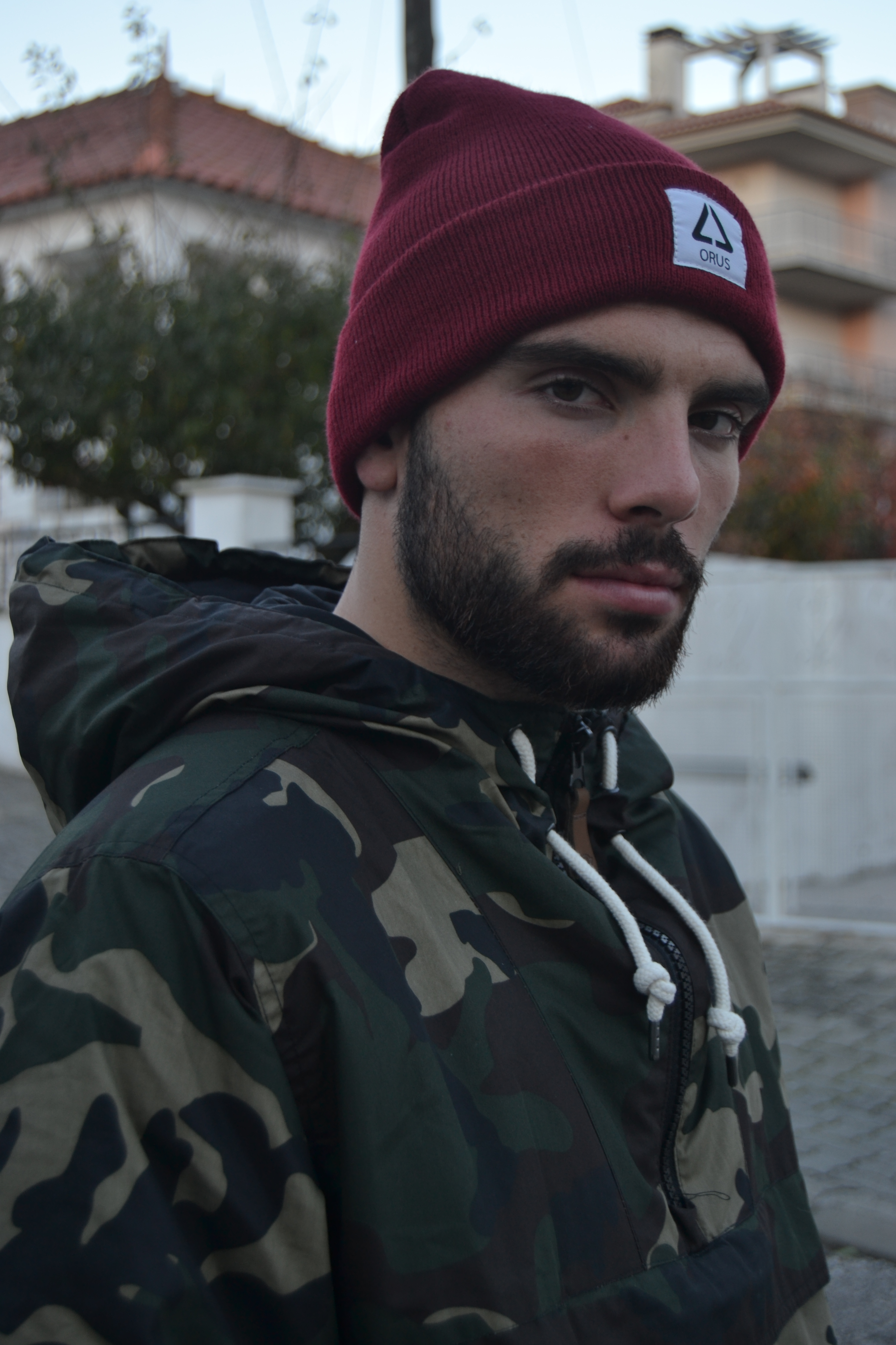 Orus Clothing & Pedro Rebocho